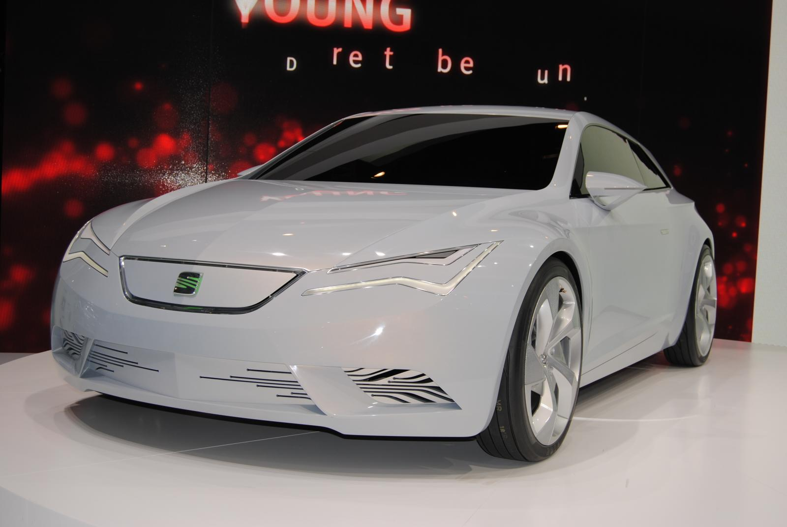 Geneva2010 464